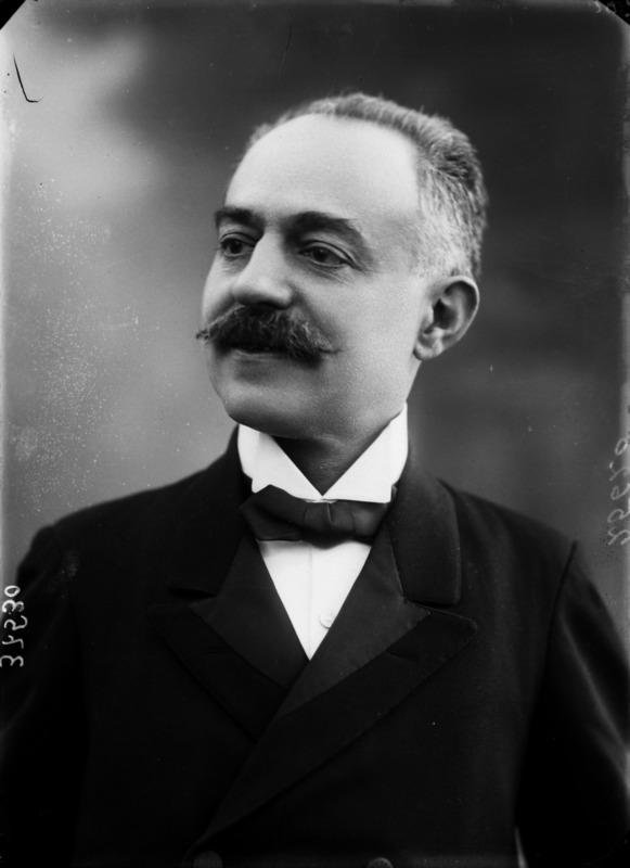 Arnaldo Bonaventura fotografato da Mario Nunes Vais